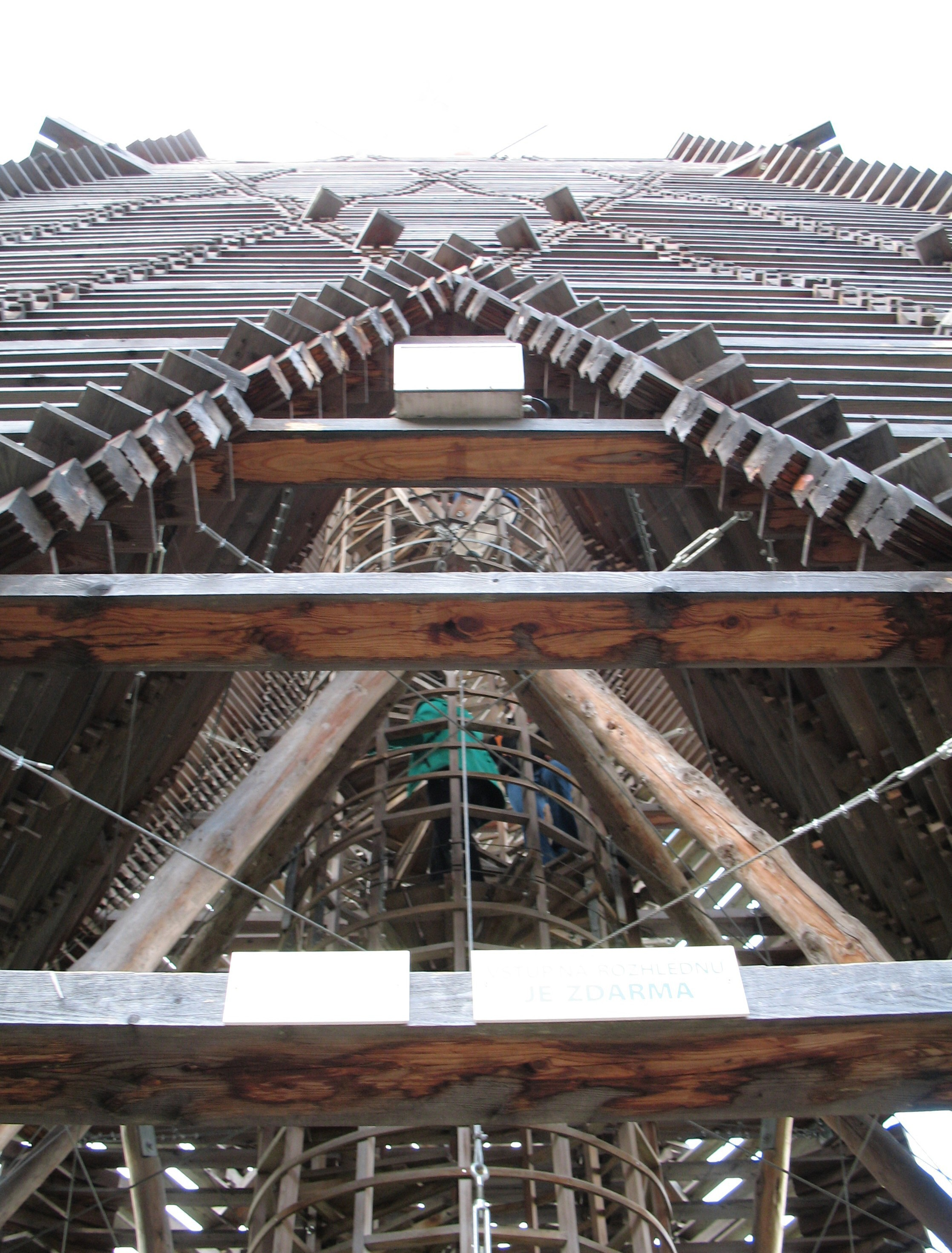 Rozhledna Bára - vnitřní schodiště